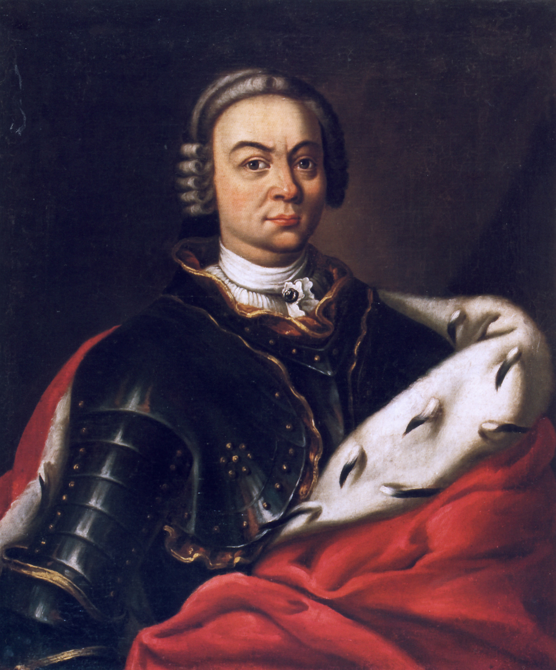 Беларуская (тарашкевіца): Партрэт Марціна Мікалая Радзівіла (Marcin Mikałaj Radzivił)